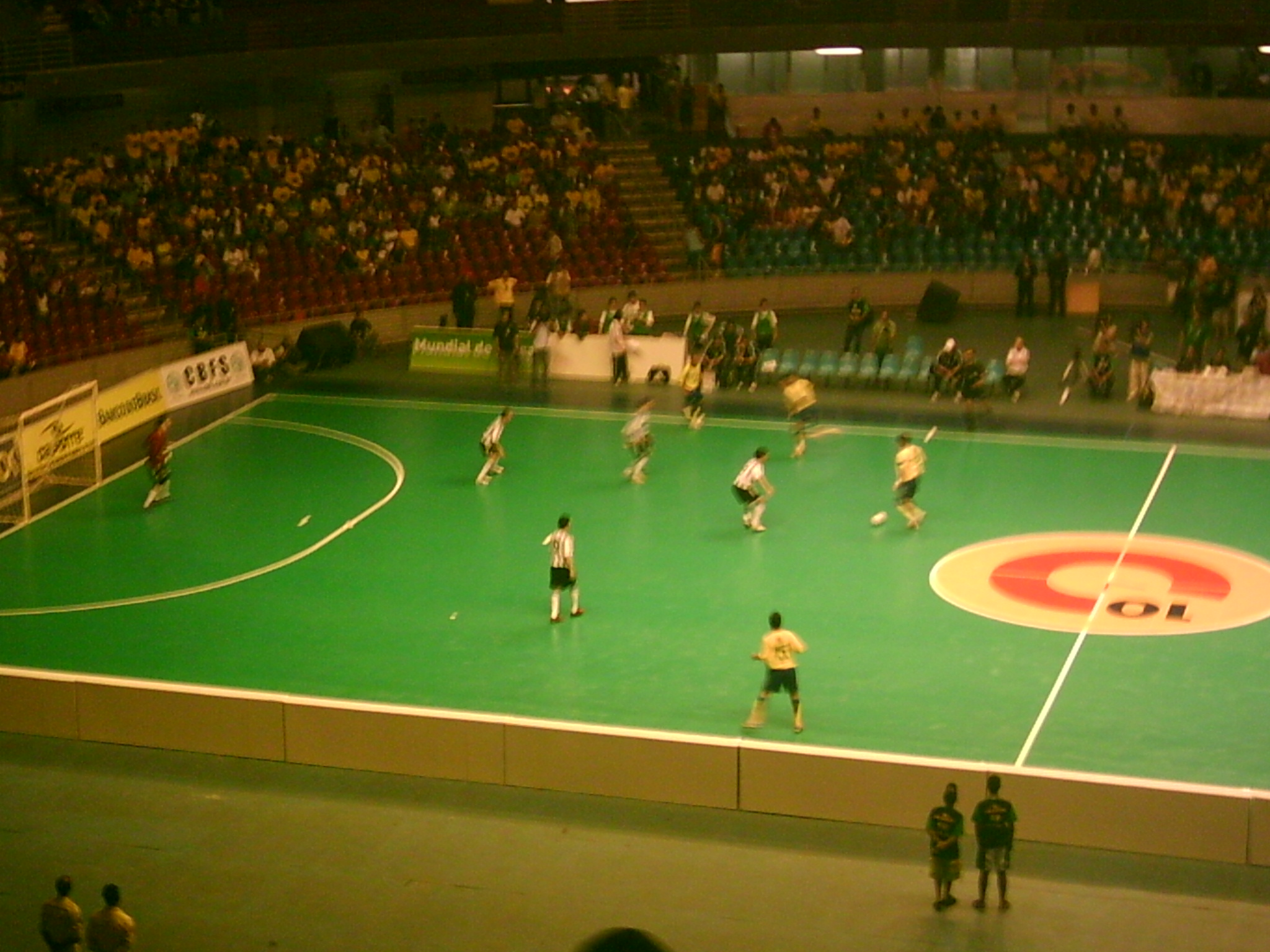 Partida Amistosa entre as seleções de Brasil e Argentina